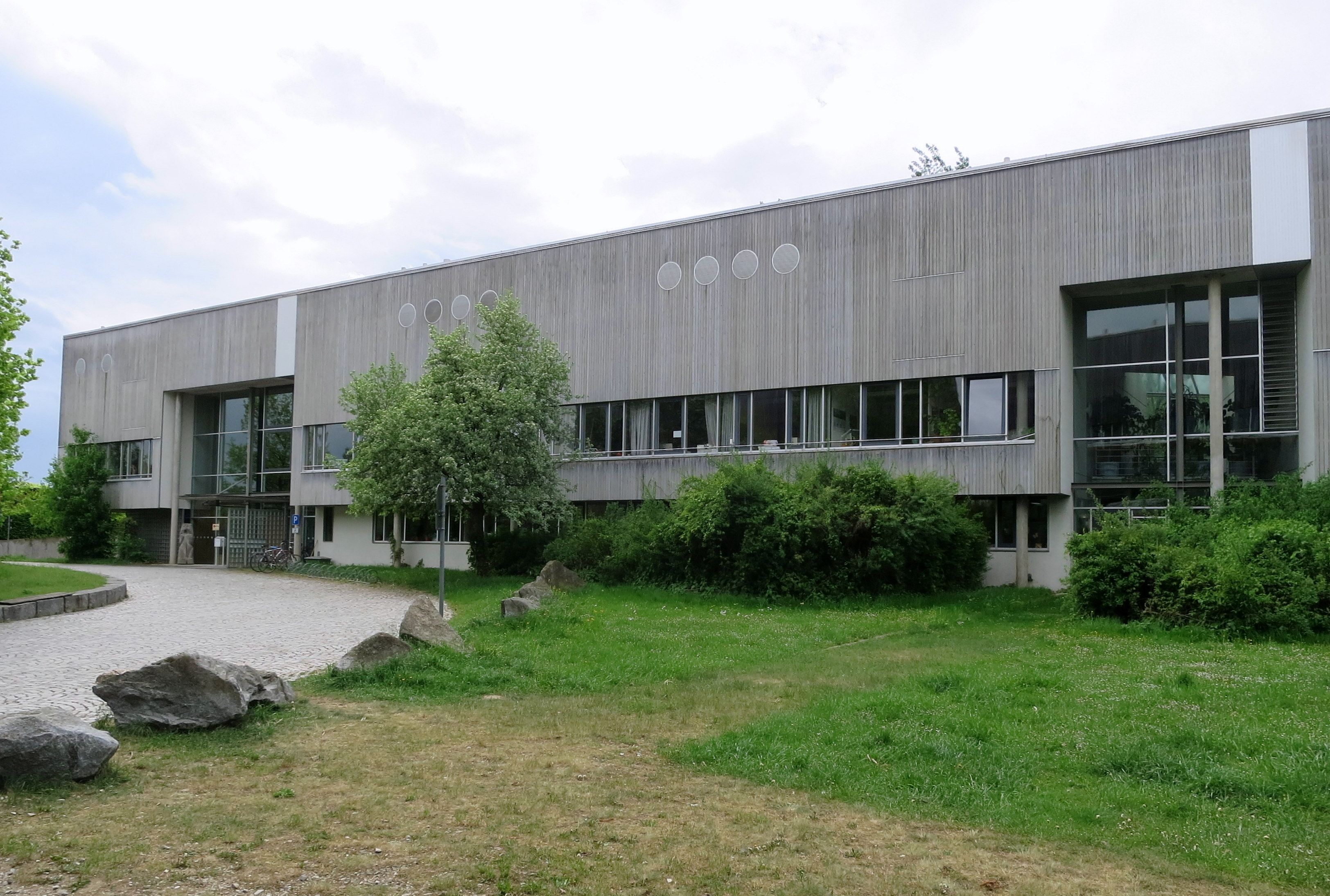 LWF-Gebäude Seite